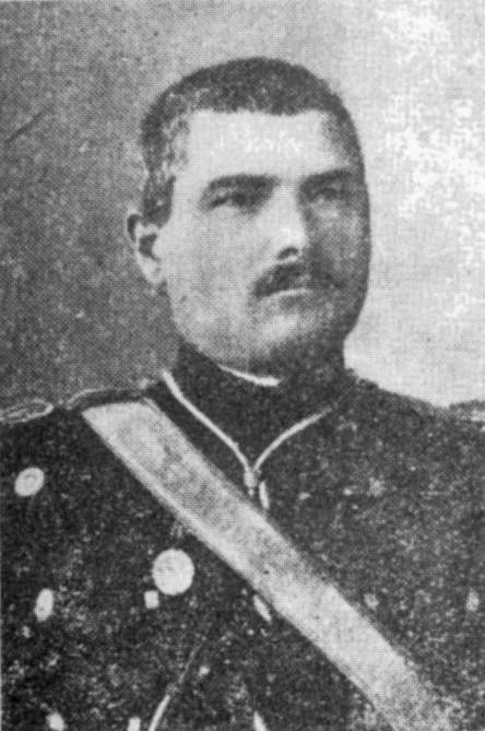 Tudor Pamfile (1883-1921)